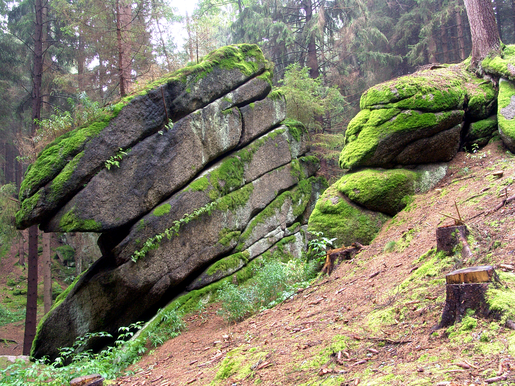 Granitfelsformationen in der Großen Teufelsküche, bei Pilmersreuth südlich von Tirschenreuth im Oberpfälzer Wald.